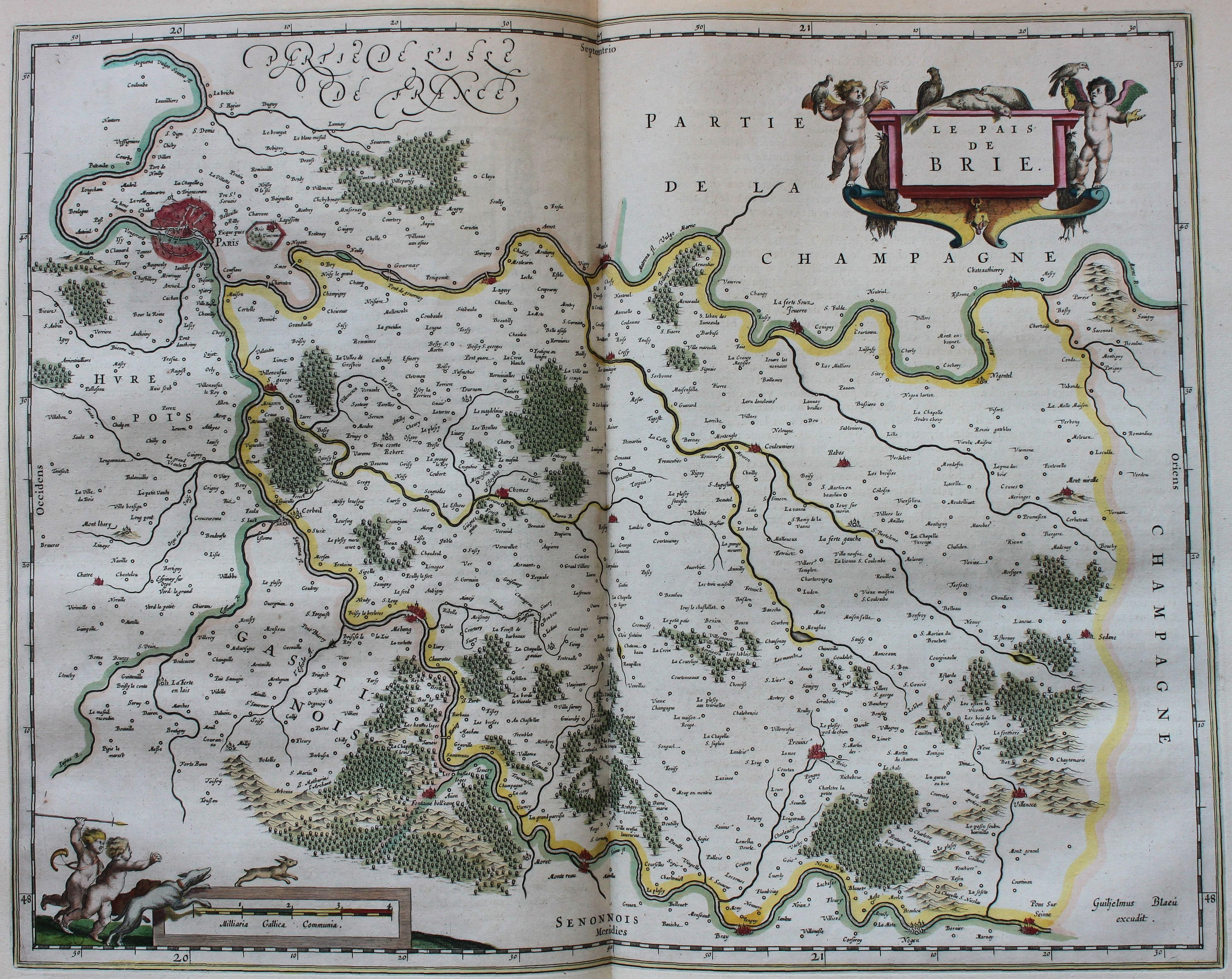 Descripción bibliográfica: Geographia Blaviana. - [Amsterdam : Juan Blaeu, 1659] . - [32], VI, 96 p., 34 f., h. 35a, 35b, 35c, 35d, 36-44 f., 34, [2], 36-40, [2], 43-70 [i. e. 75], [1] f., [20] p. de map., [9] f. de map., [4] f. pleg. de map., [2] f. de plan., [2] f. ge grab. : |bil. ; |cFol. marca major (57 cm.) . - En la dedicatoria a Felipe IV: "Presenta ... El Atlas Universal y Cosmographico de los orbes y terrestre ... Juan Blaeu" . - Título tomado del frontispicio. -- Privilegio fechado en 1659. -Errores de pag. - Sign.: 1, *2, **3, ***-****2, a-e2, A-I2, K1, L-Z2, Aa-Dd2, 4 2, Ee-Ff2, A-I2, K1, L2, M1, N-Y2, Z5, Aa-Dd2, Ee1, A-D2, E-F1, G-I2, K-L1, M-O2, P1, Q-Z2, Aa-Bb2, Cc1, Dd3, Ff-Zz2, Aaa-Bbb2, . - Frontispicio grab. col. -- Incluye un total de 49 il. entre map., plan. i grab. Materia: Atlas - Obras anteriores a 1800 Impresor: Blaeu, Joan, 1596-1673, imp. Lugar de impresión: Holanda. Amsterdam Localización: Vea la ilustración en su contexto Visite también la exposición "Cartografía histórica en la Biblioteca de la Universidad de Sevilla"